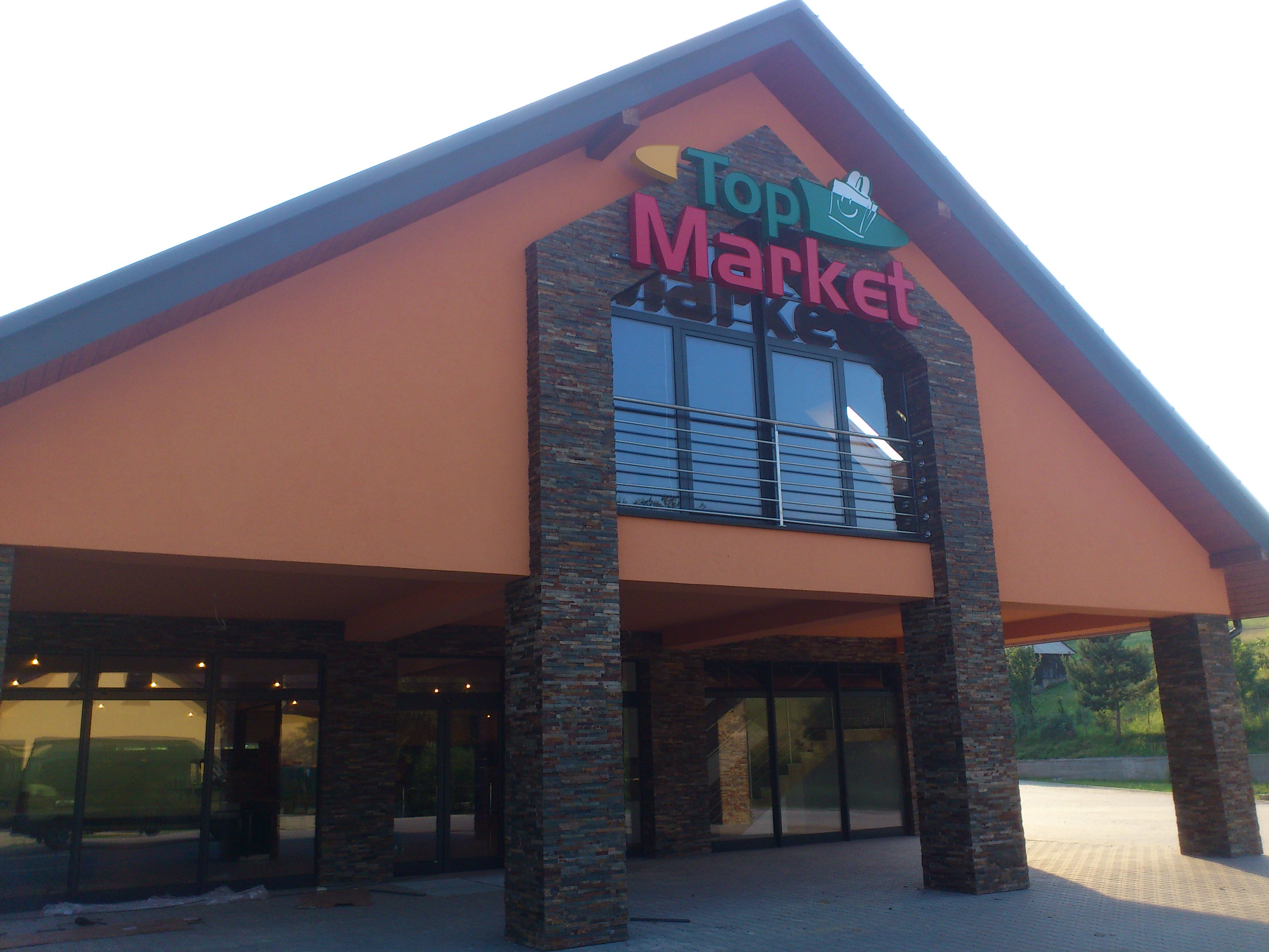 Tokarnia - sklep Top Market, marki należącej do Polskiej Grupy Supermarketów